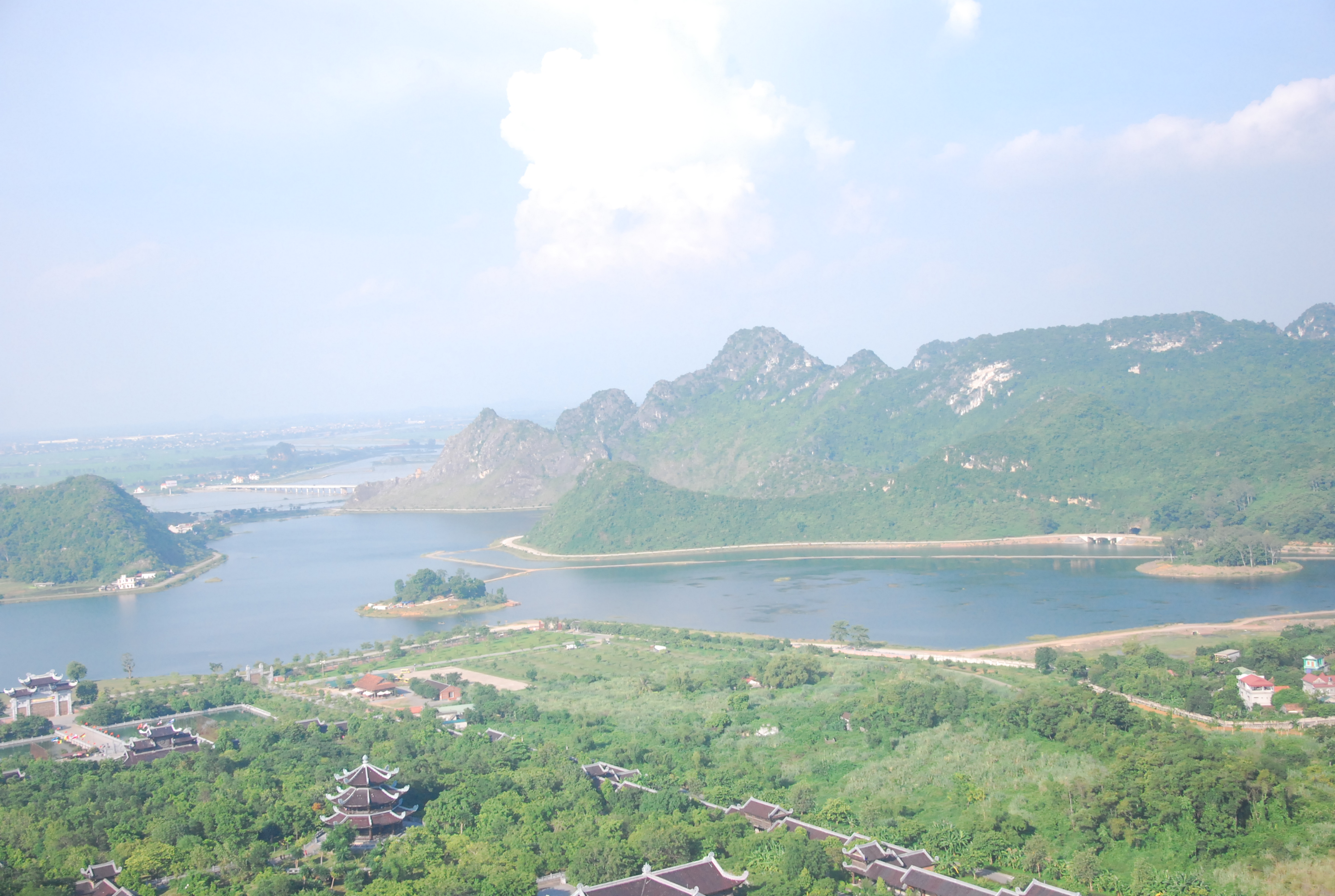 Quần thể chùa Bái Đính ở Ninh Bình